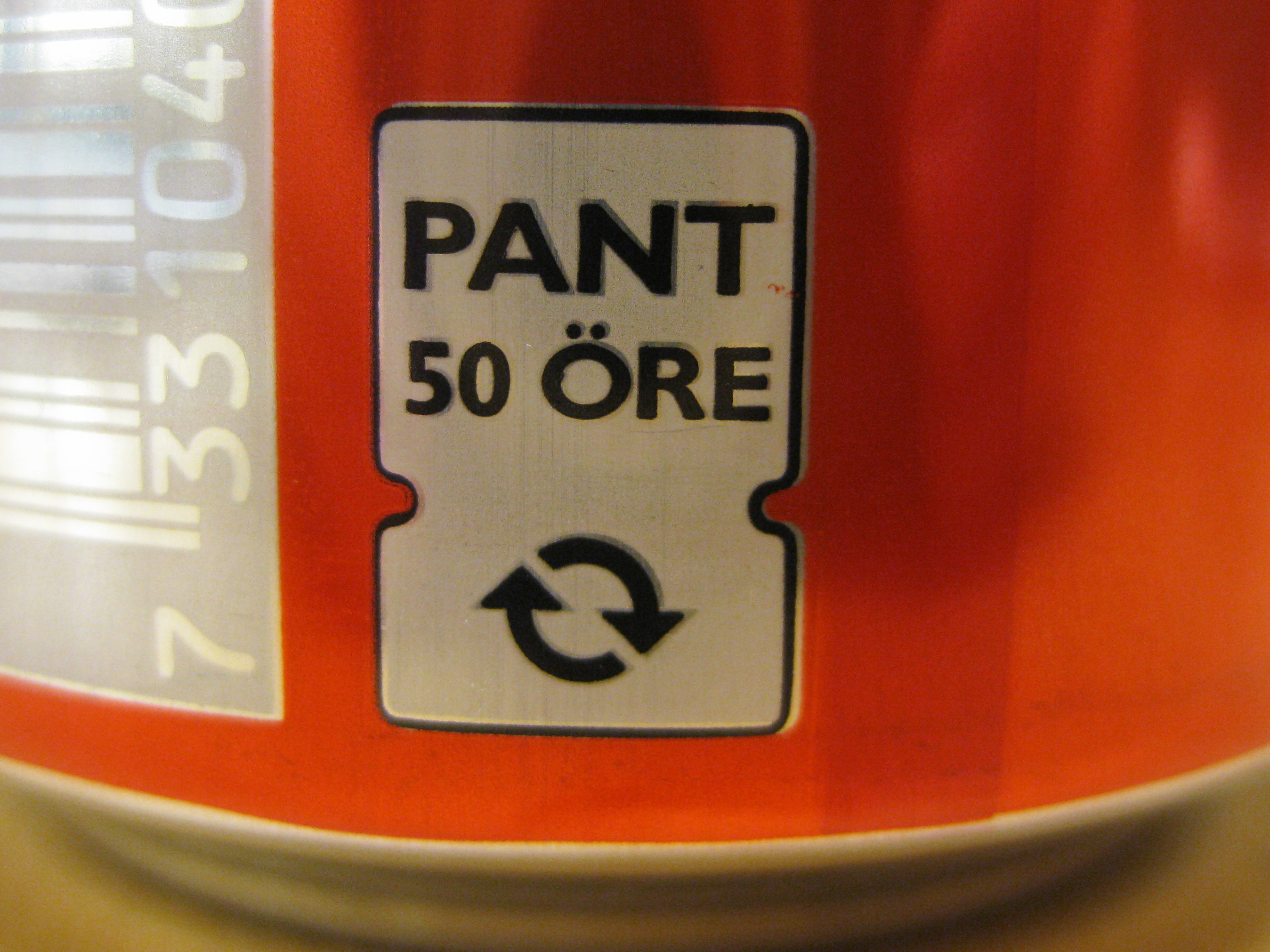 Pantsymbol på 33-centilitersburk.